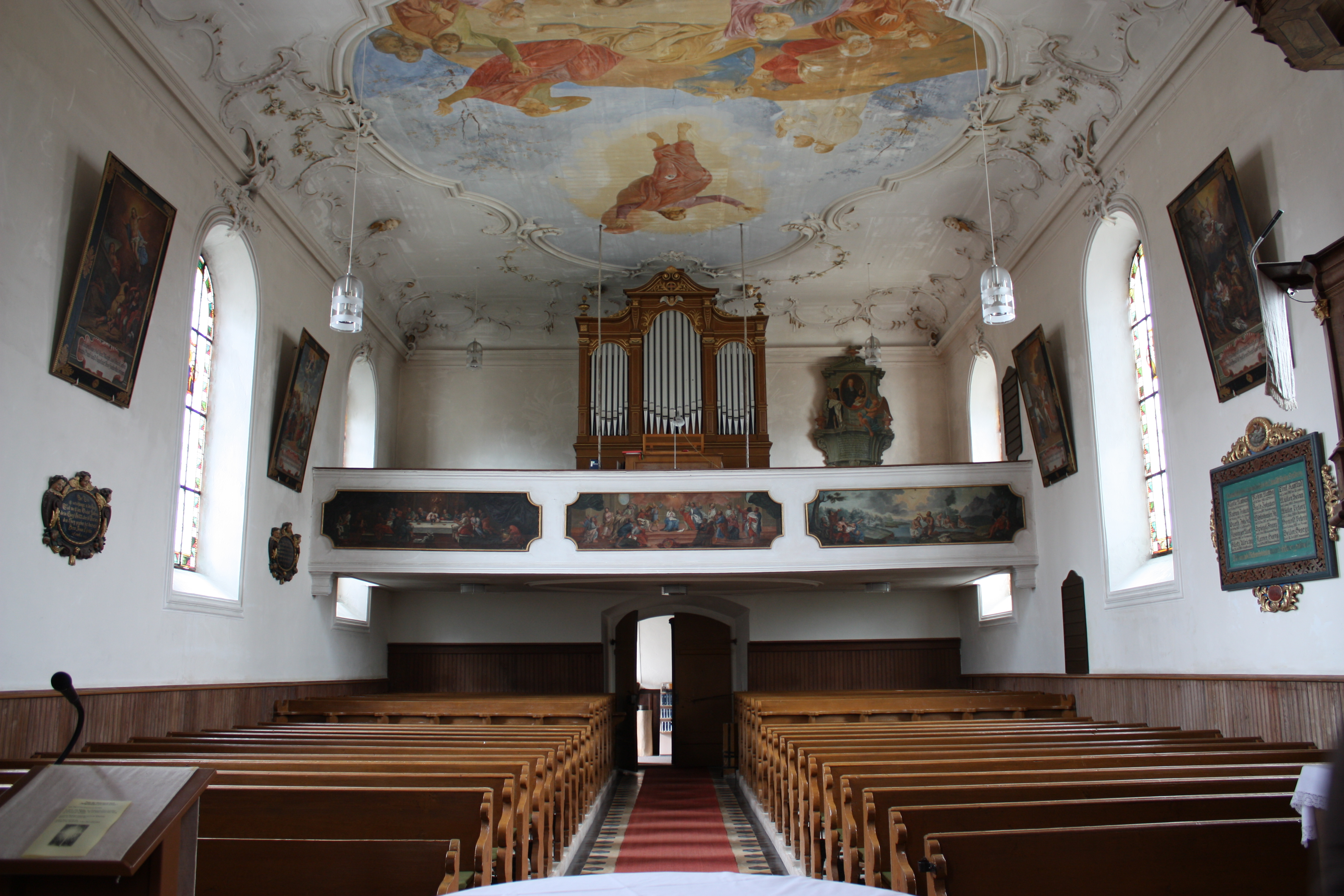 Die Alte Turmuhr der Kirche St. Agatha in Dickenreishausen. - Google Maps - Google Earth